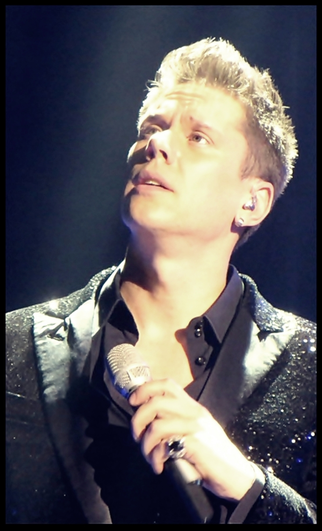 David de IL DIVO en concierto. 2014